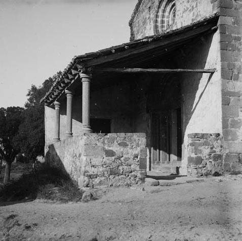 Imatge